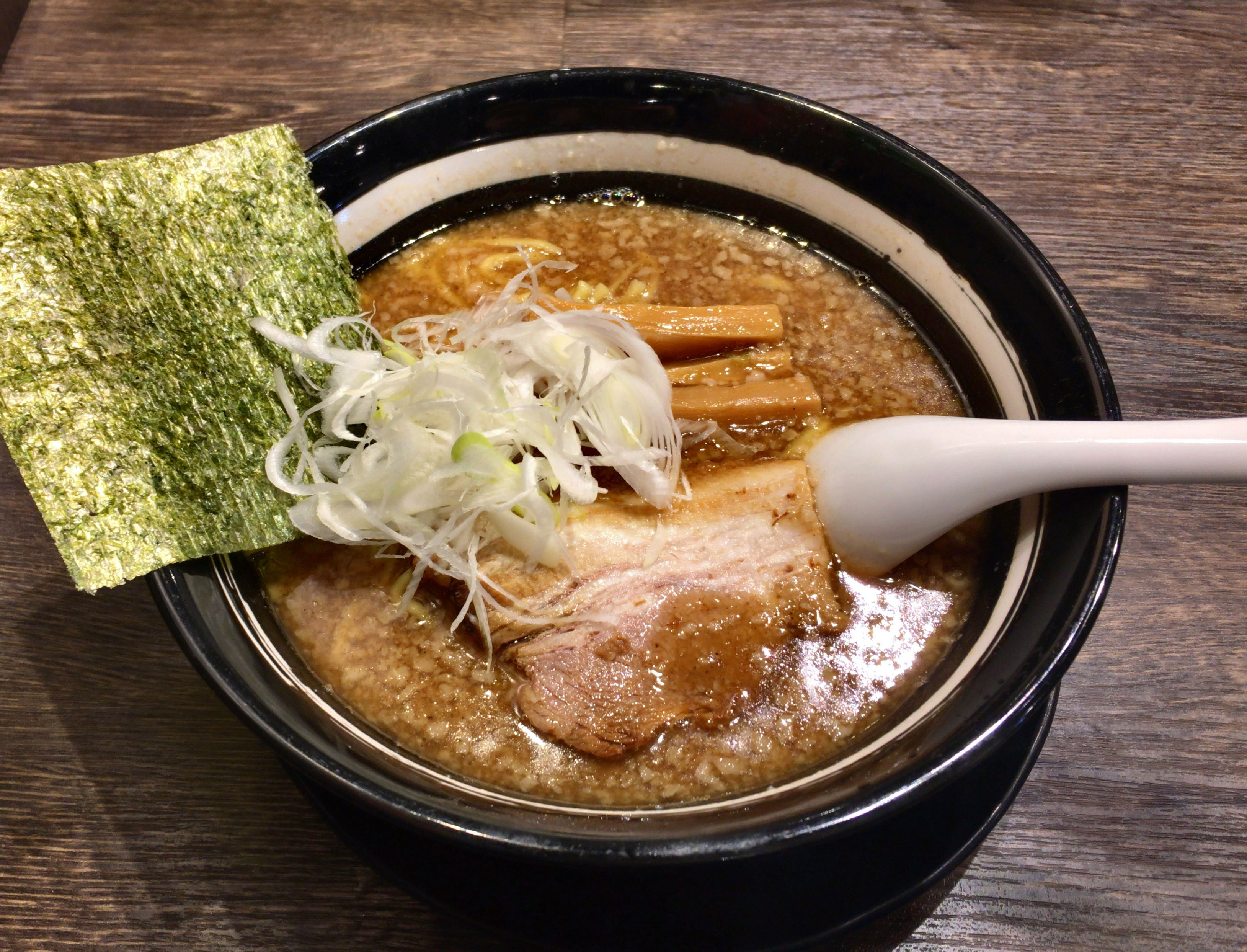 節骨麺たいぞうの節骨こってりらーめん